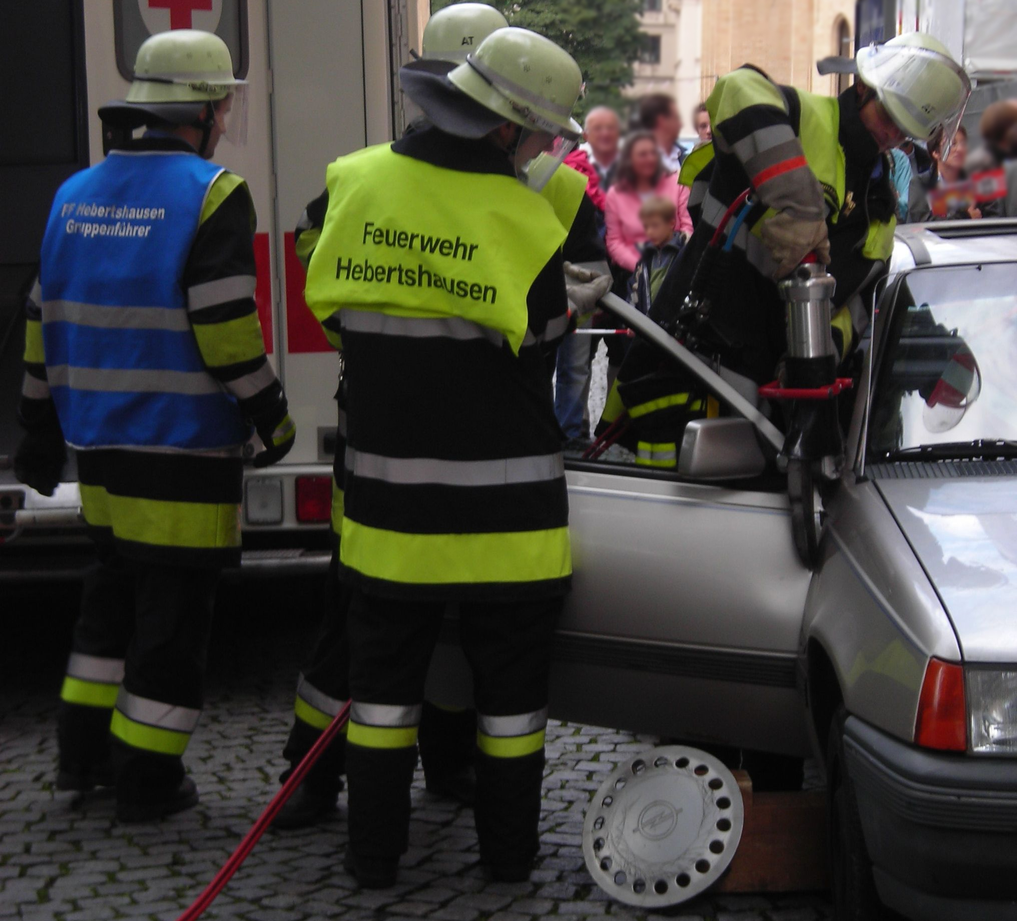 Freiwillige Feuerwehr Hebertshausen (Bayern) bei einer Vorführung mit einer hydraulischen Rettungsschere